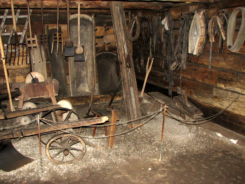 Pszczyna - Zagroda Wsi Pszczyńskiej (zabytek nr A/1219/76)